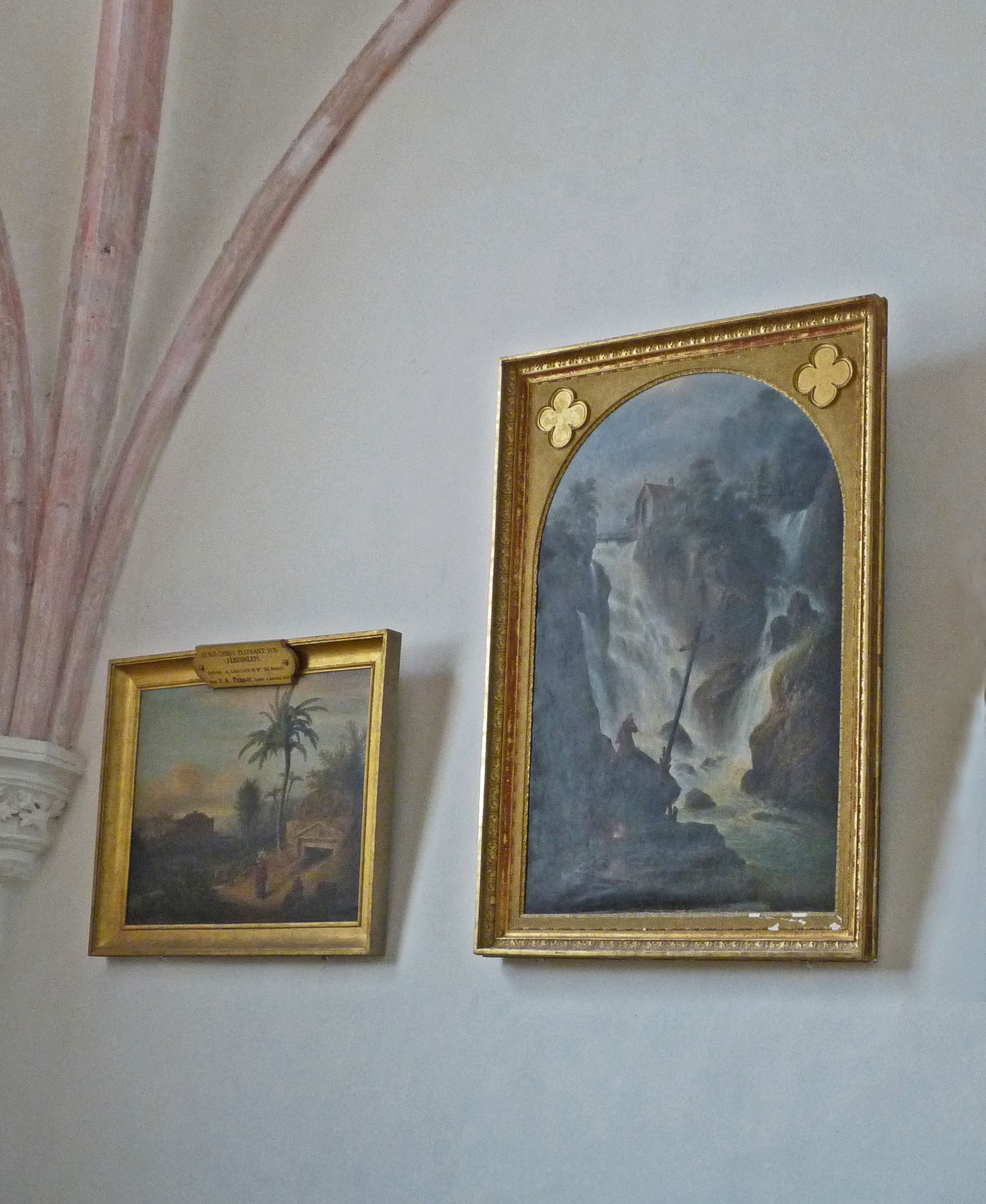 Deux tableaux de François Alexandre Pernot dans la chapelle du Bon Pasteur à l'église Notre-Dame de Wassy (Haute-Marne) : à gauche Jésus pleurant Jérusalem (premier quart du XIXe siècle, classé en 1974} ; à droite, Saint Franciscain priant dans un paysage (second quart du XIXe siècle)